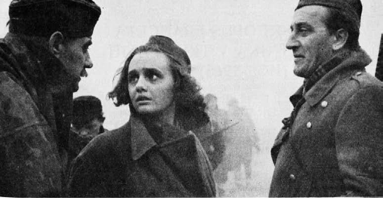 Prizor iz filma »Na svoji zemlji« — Lojze Potokar, Majda Potokarjeva, France Presetnik.